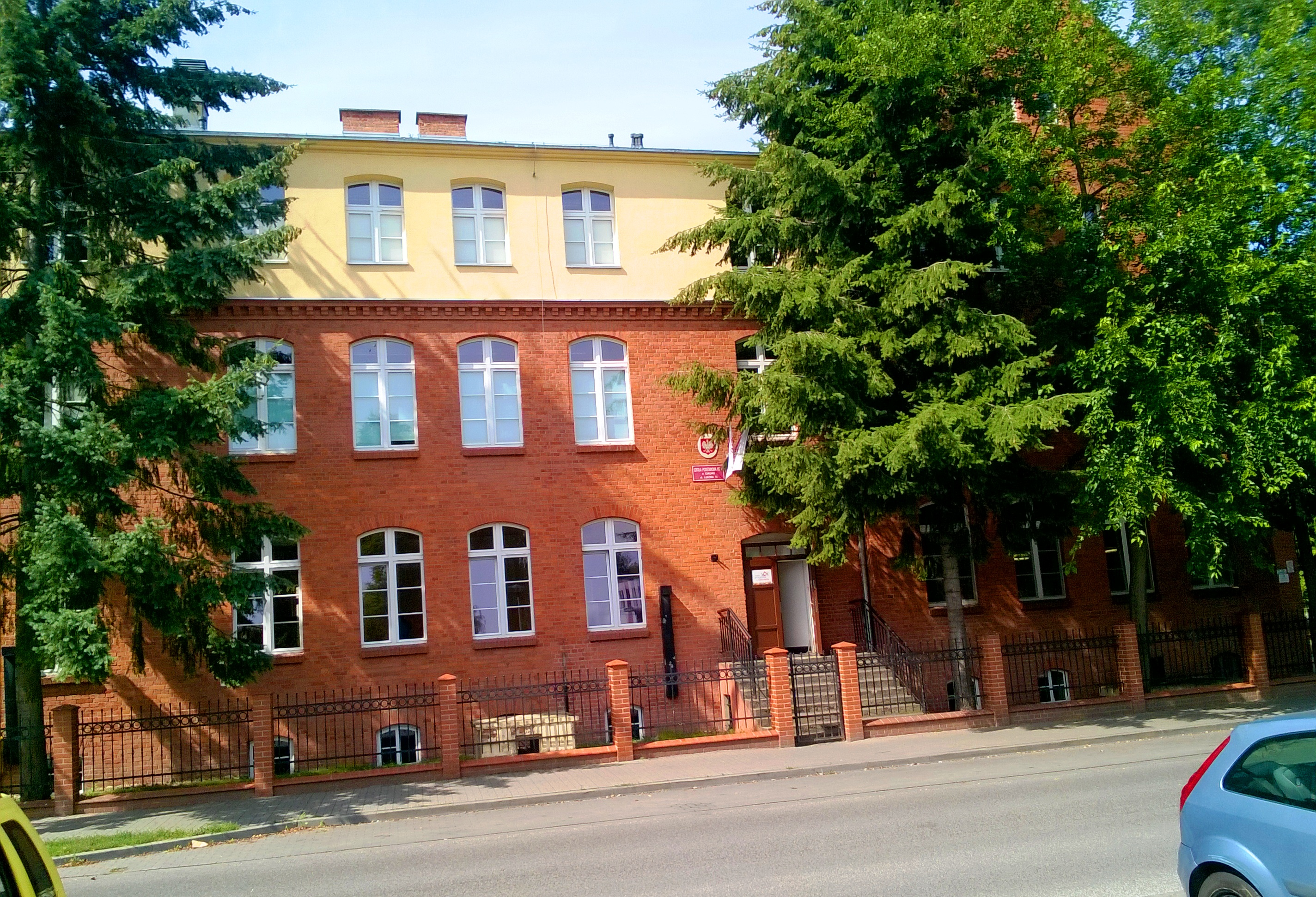 Budynek Szkoły Podstawowej nr 6 w Toruniu2